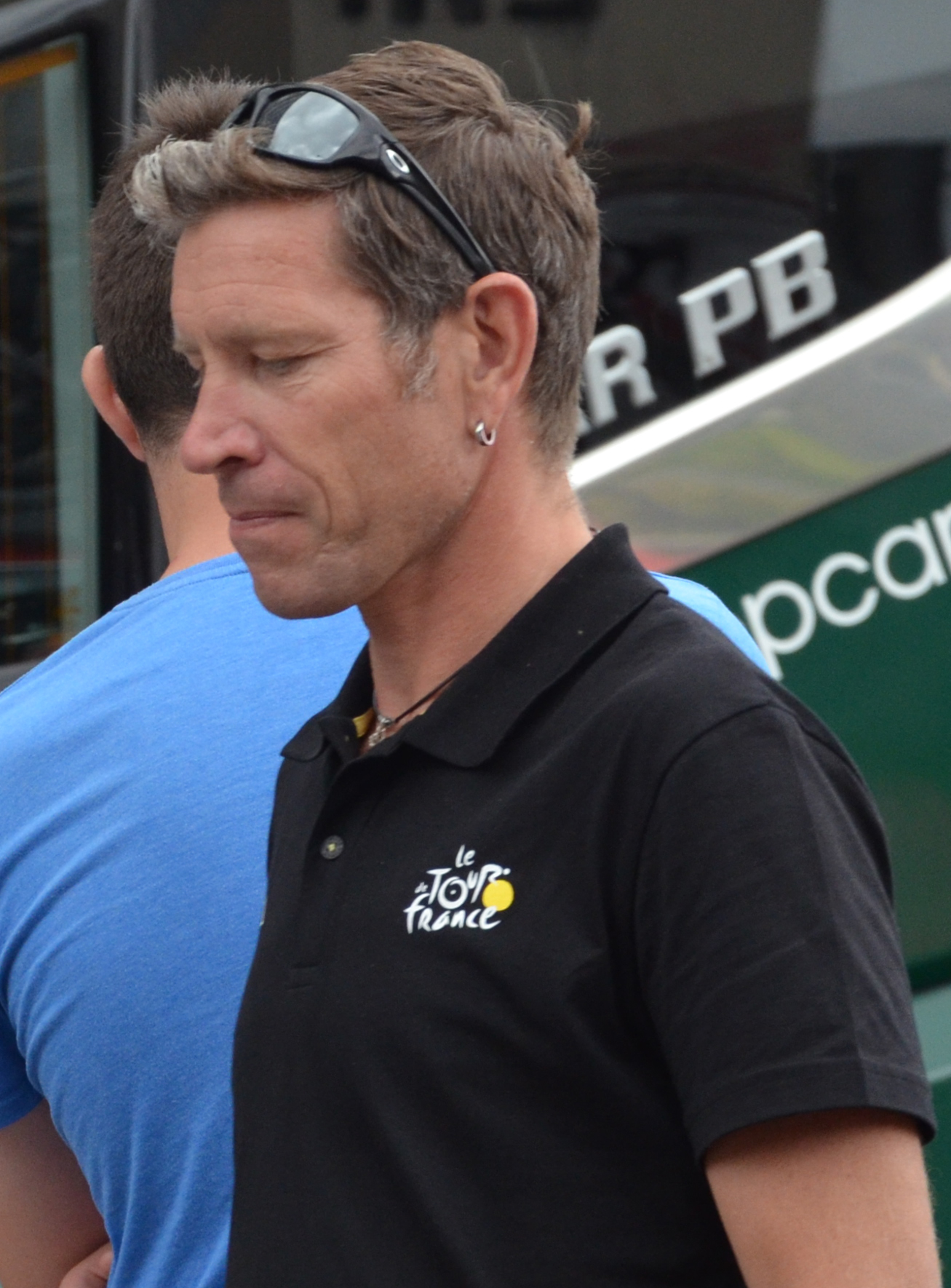 Laurent Brochard au départ de la 8ème étape du Tour de France 2015, à Rennes.